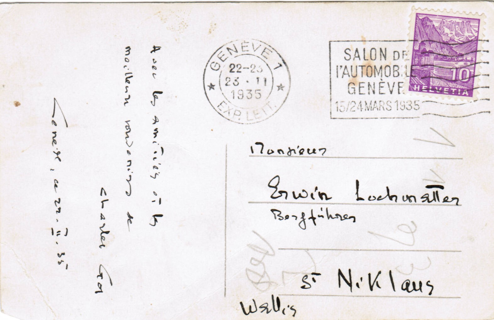 Im Jahre 1935 schrieb der Genfer Schriftsteller Charles Gos eine Karte an den Bergführer und Unternehmer Erwin Lochmatter, St. Niklaus, Wallis, Schweiz.